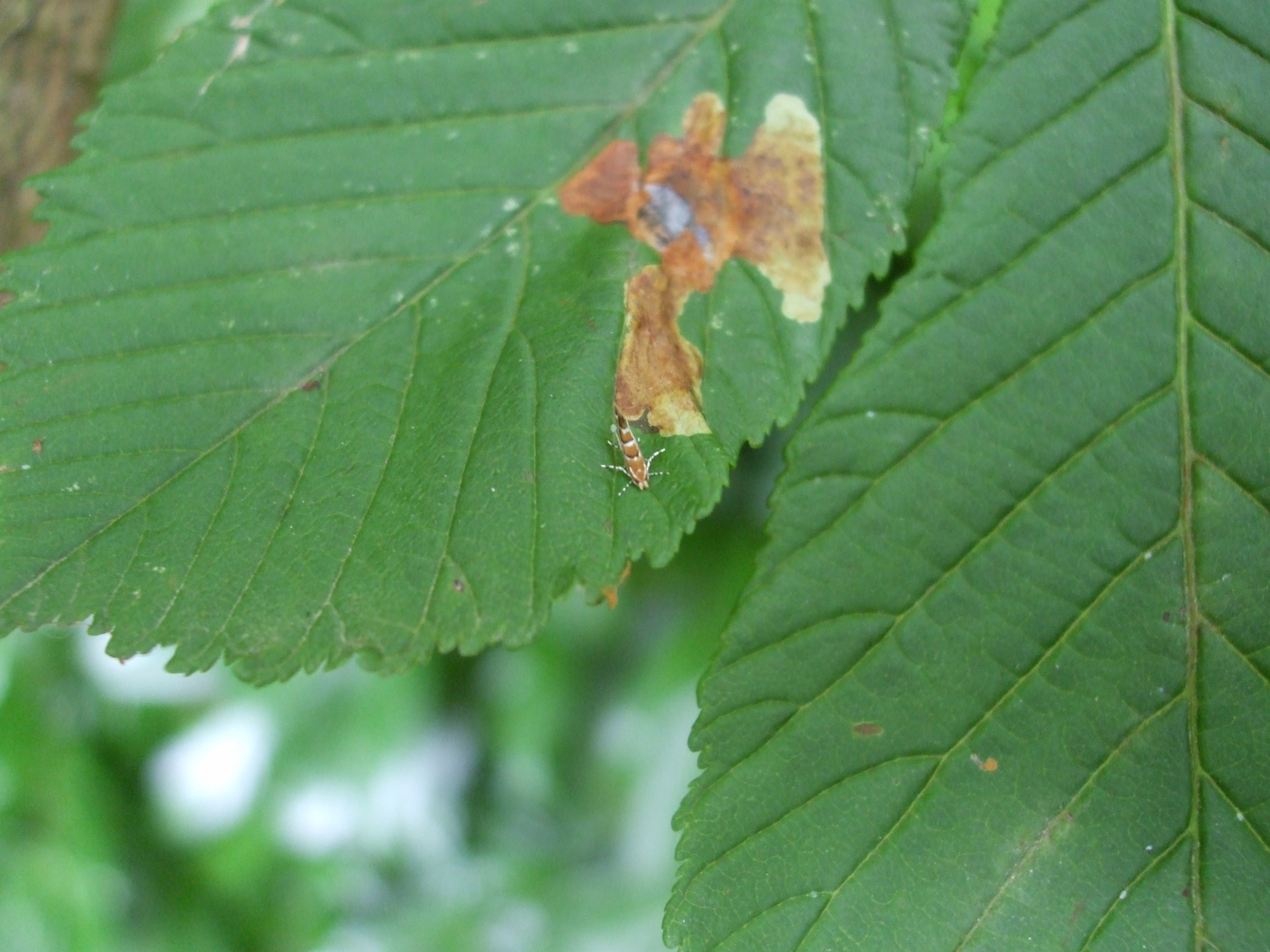 Rosskastanien-Miniermotte von vorne auf einem Kastanienblatt